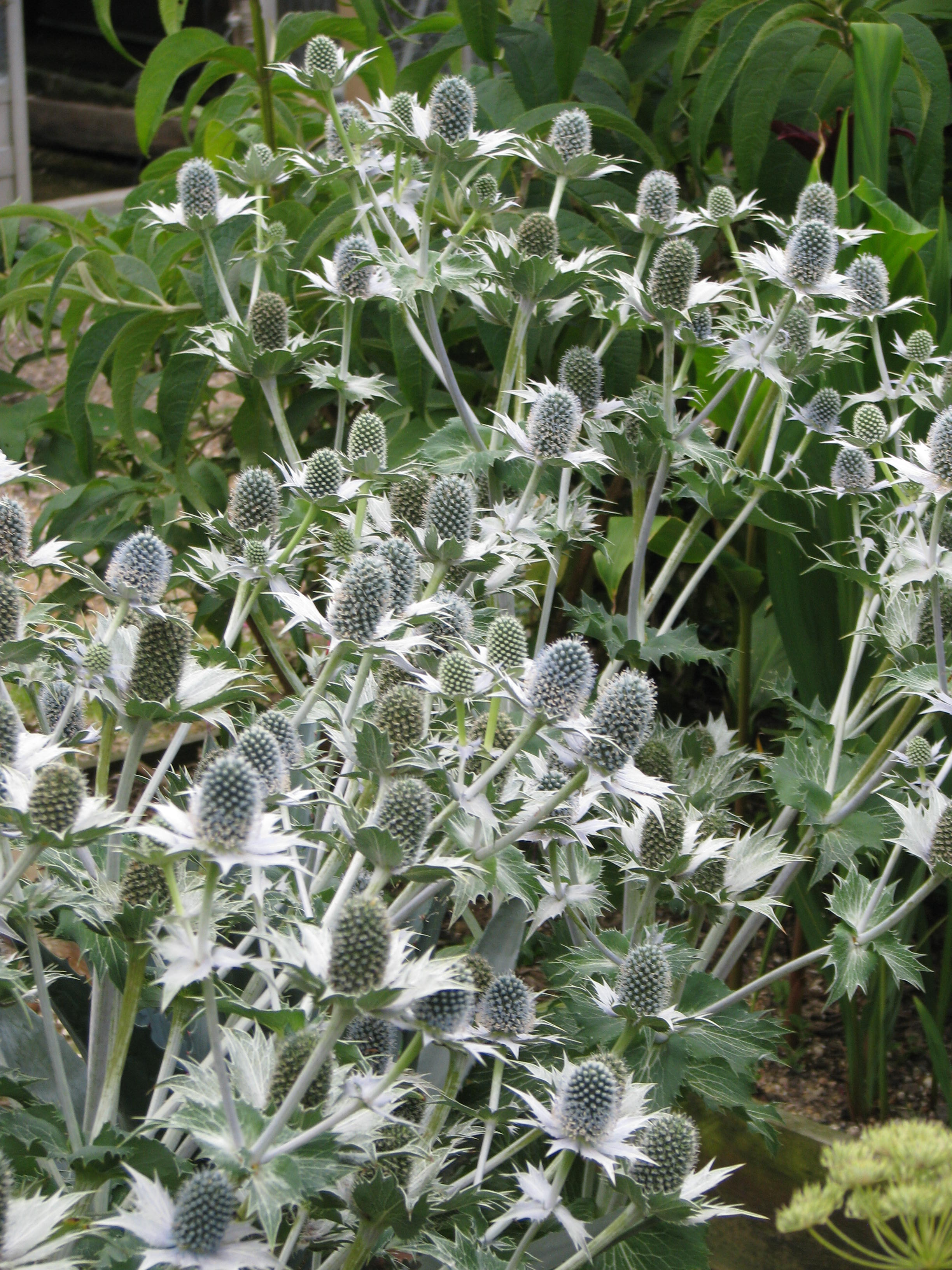 Eryngium giganteum